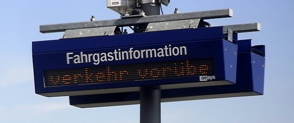 Dynamischer Schriftanzeiger (DSA) der Deutsche Bahn AG auf dem Bahnhof Straßkirchen.